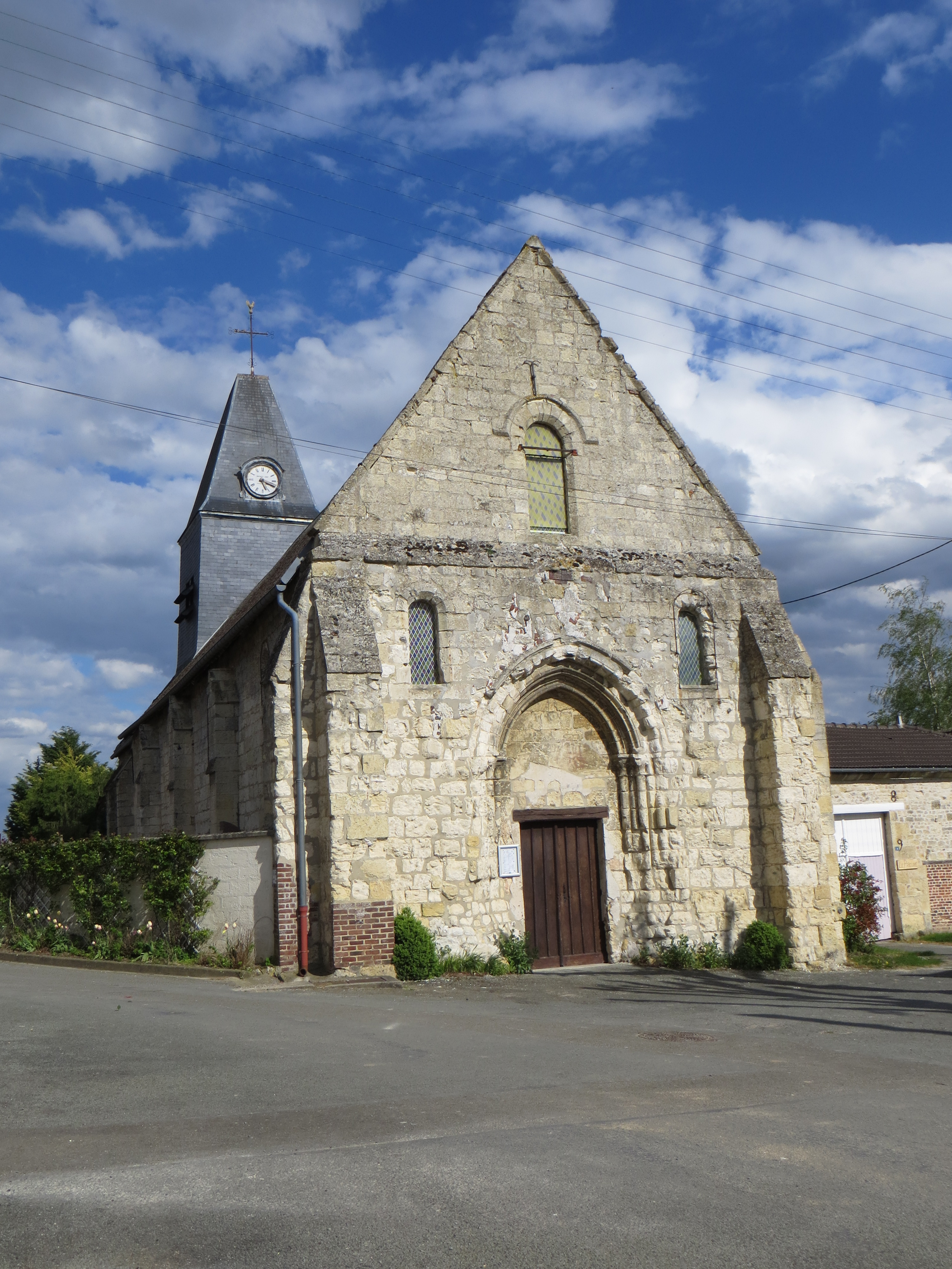 Vue générale de l'église